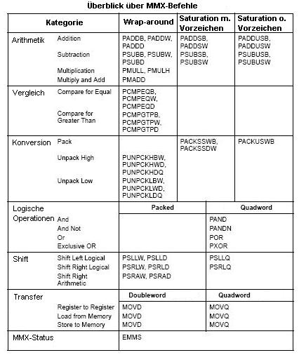 Overview of the MMX-Instruction-Set